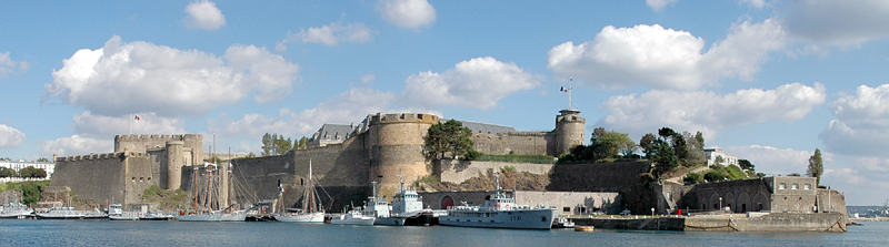 Chateau de Brest